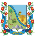 Герб Шахівської сільської територіальної громади Добропільського району Донецької області.